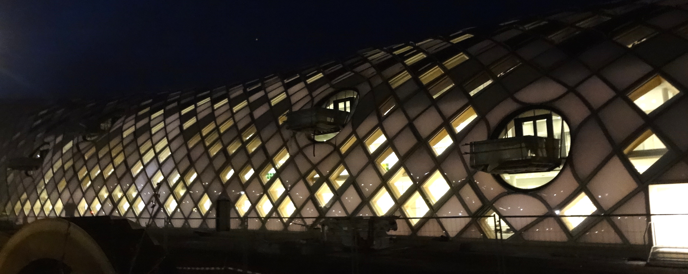 Bâtiment en construction du Swatch Group à Bienne, Jakob-Stämpfli Strasse.